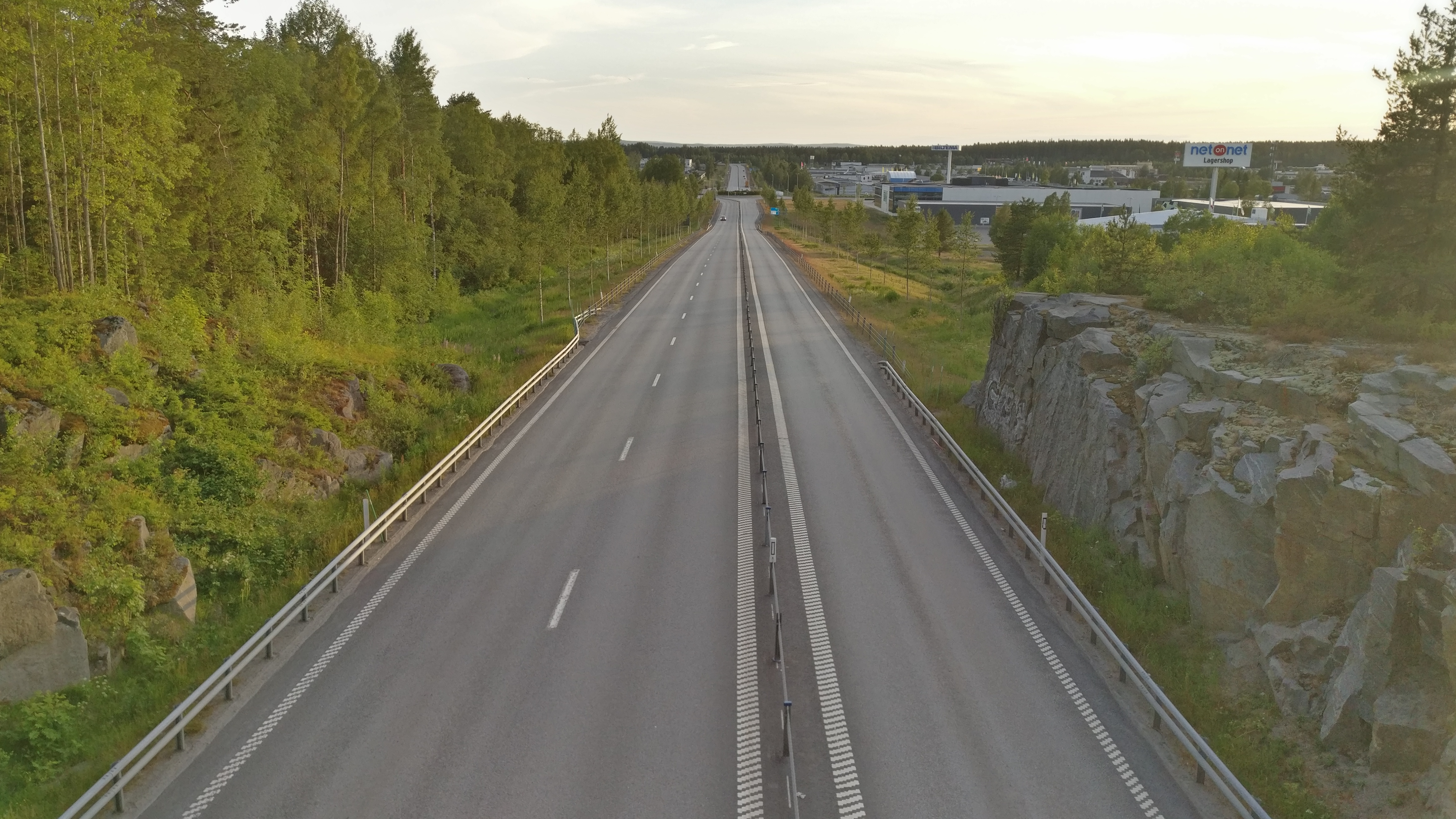 Riksväg 92 genomfart Ersboda